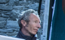 Le navigateur Pierre Antoine quelques jours avant le départ de la Route du Rhum 2014. Détail d'une photo où il est en compagnie de dix autres navigateurs.